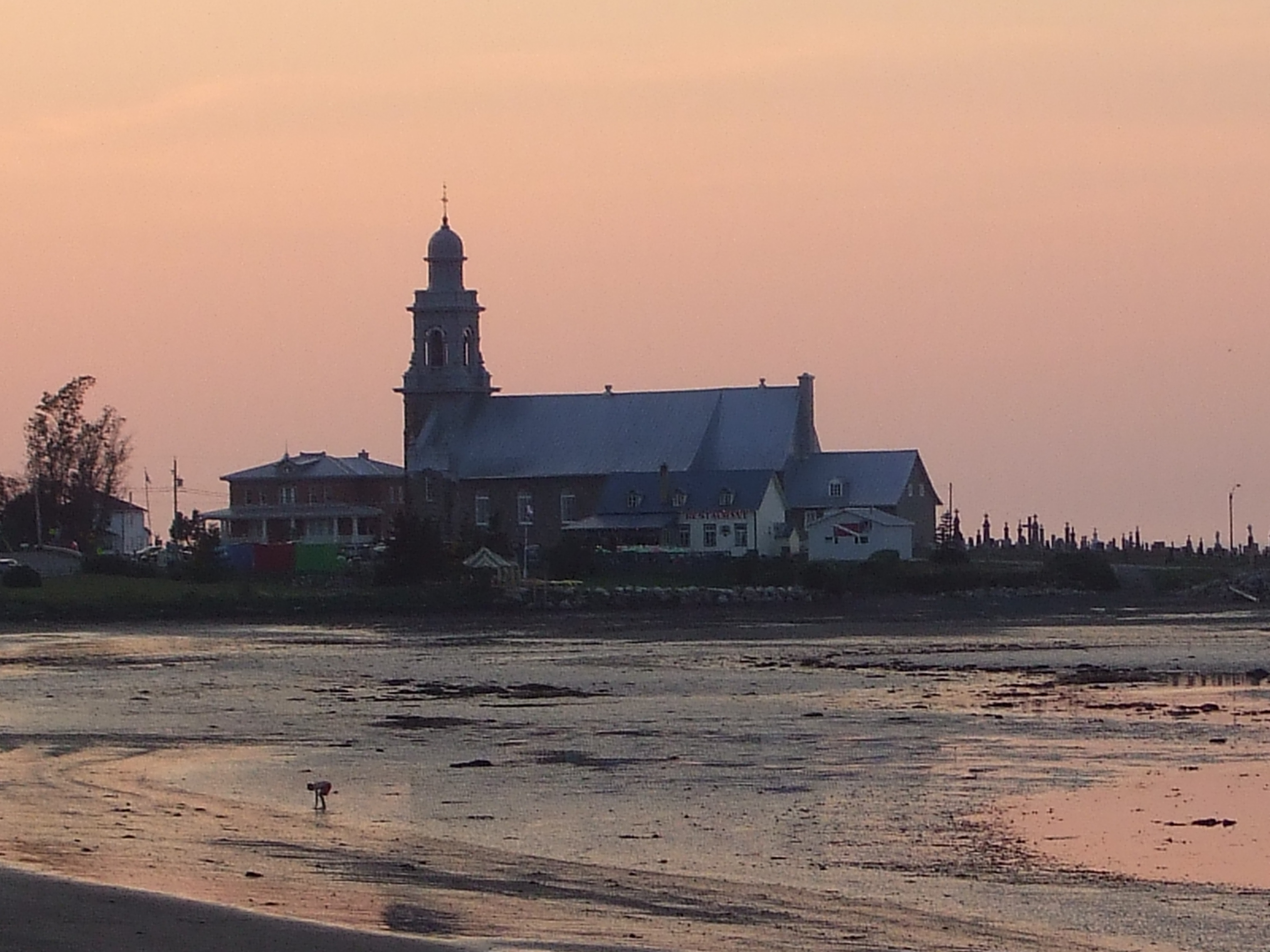 Site de l'église et du cimetière de Sainte-Luce (Sainte-Luce, ID: 8705)